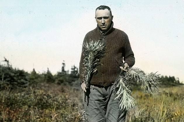 Le frère Marie-Victorin en Minganie Conrad Kirouac (frère Marie-Victorin) en 1928 à la grande île à la vache marine, dans le golfe du Saint-Laurent, tenant un chardon de Mingan (cirsium minganense), une espèce de chardon qu'il avait identifiée en 1924.